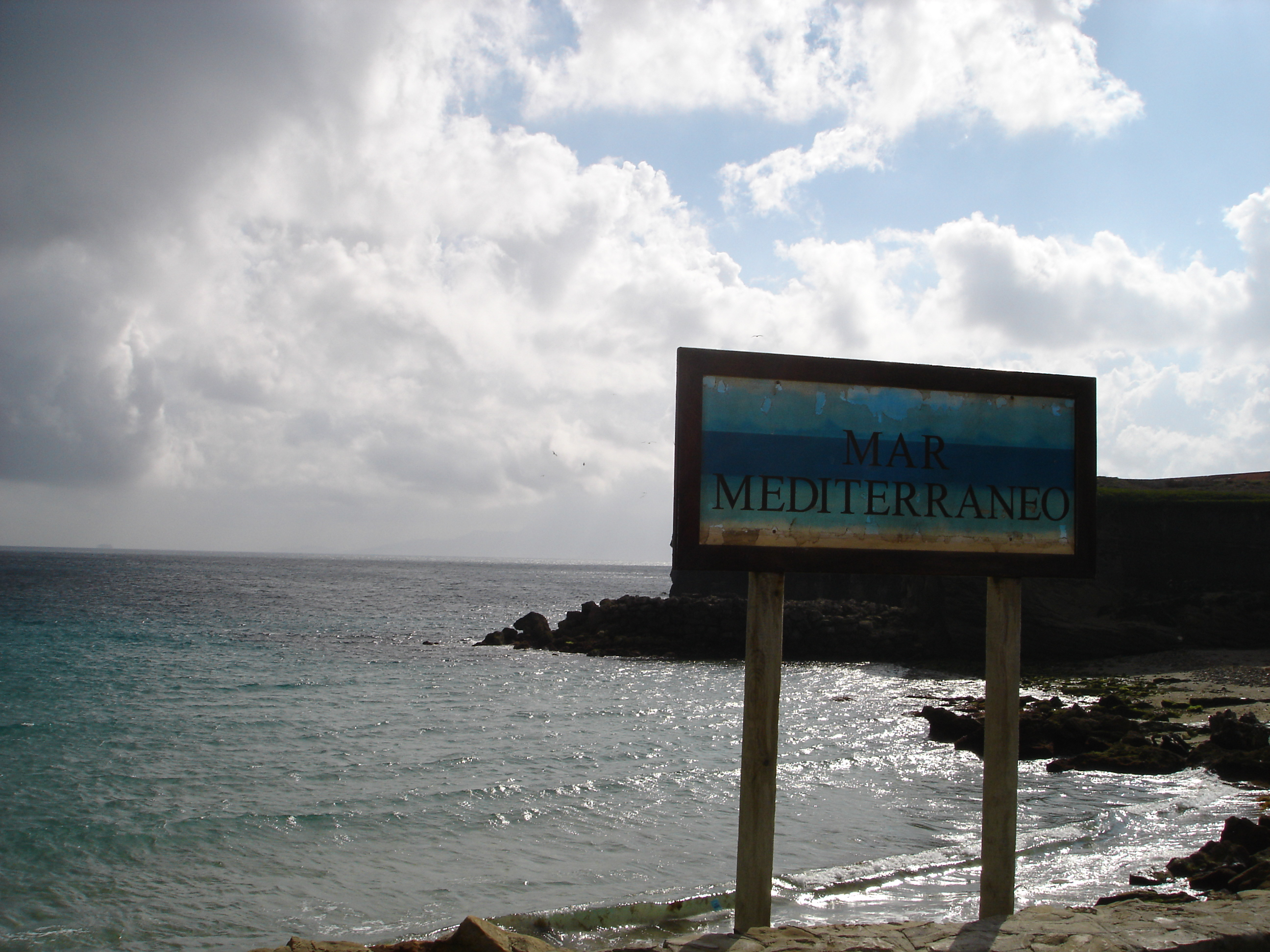 Mar Mediterráneo desde la Punta de Tarifa